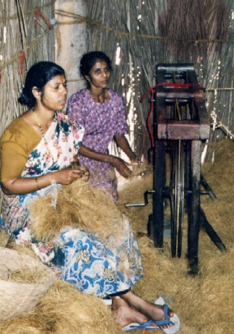 Sisal production in Goa (province of Salcete) Výroba sisalu v Goe (Salcete, zázemí) photo: -jkb- 2000/2001